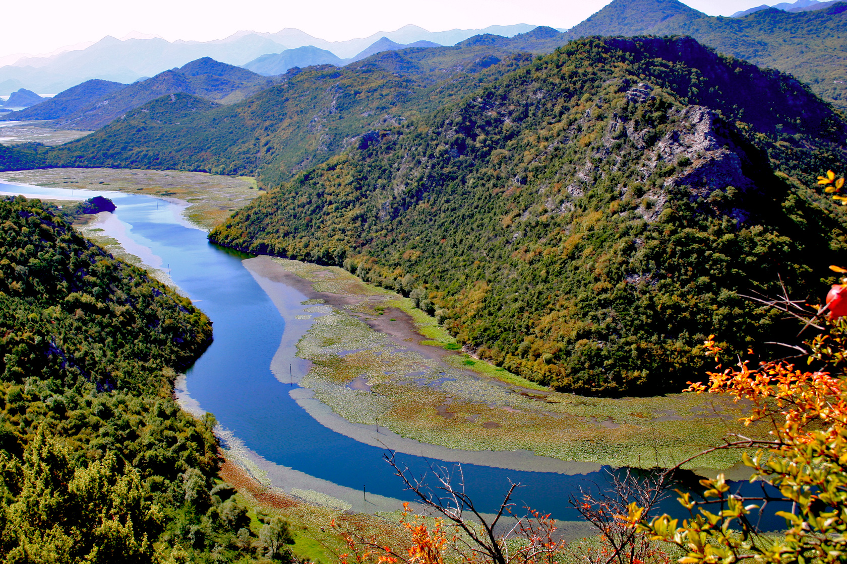 River Crnojevica rijeka in Montenegro.